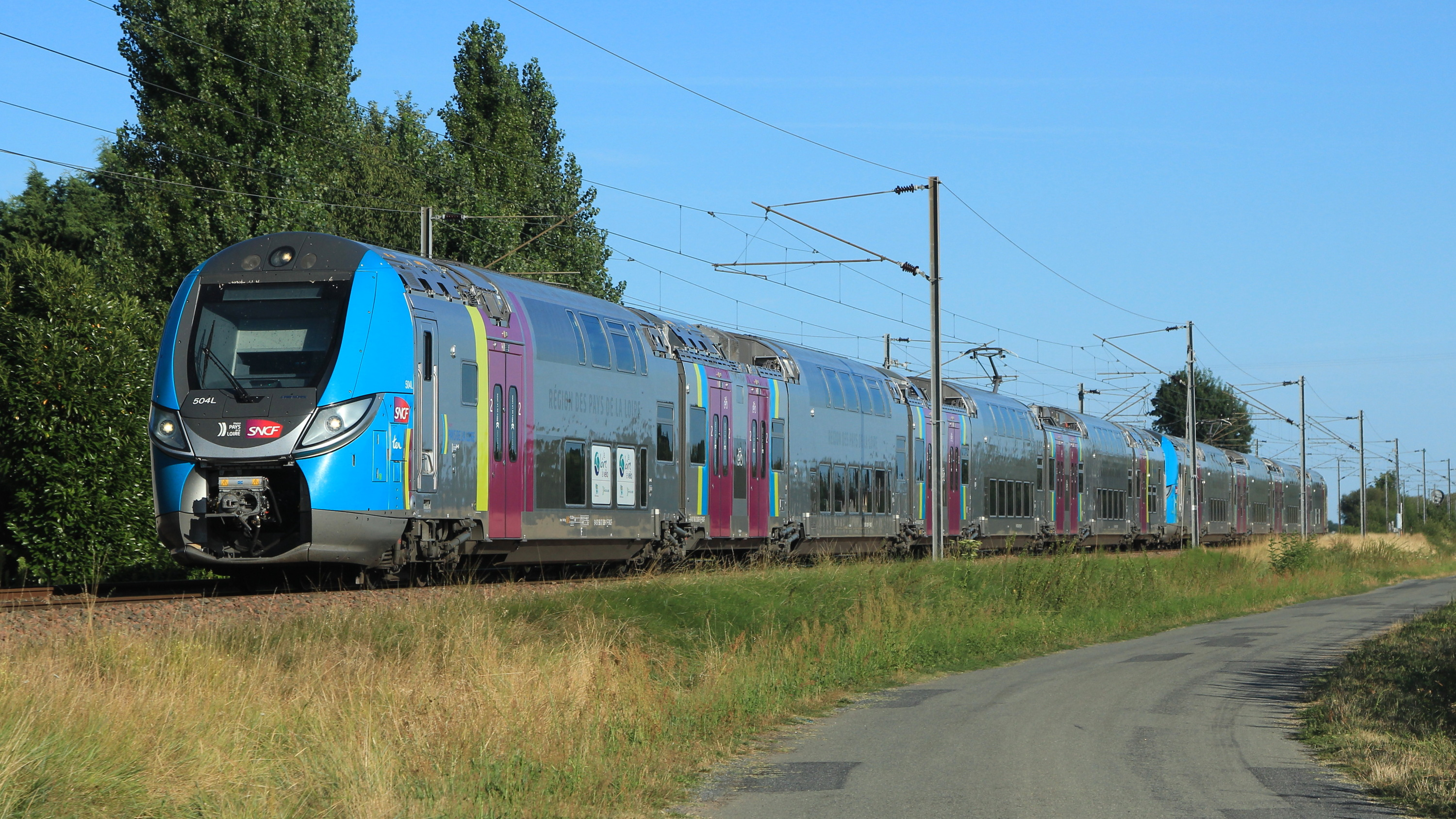 Les Region2N n° 504L et 503L (Z 56507/08 et Z 56505/06) en version estivale « Jumbo vélo » assurant le TER 2OO Interloire n° 860007 (Orléans - Le Croisic) approchent de la gare de La Ménitré, entre Saumur et Angers.